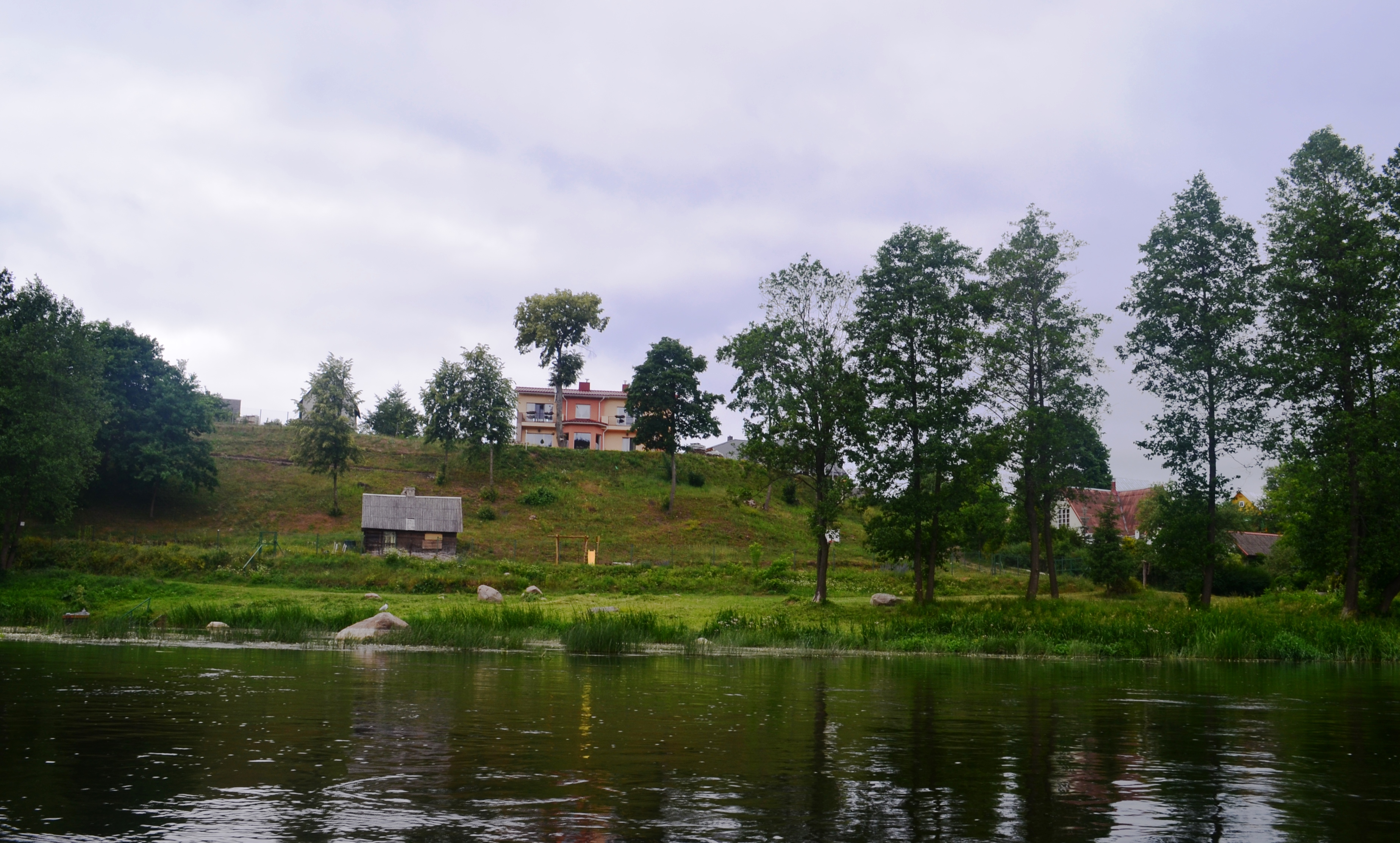 Valai (Trakų raj.) nuo Neries